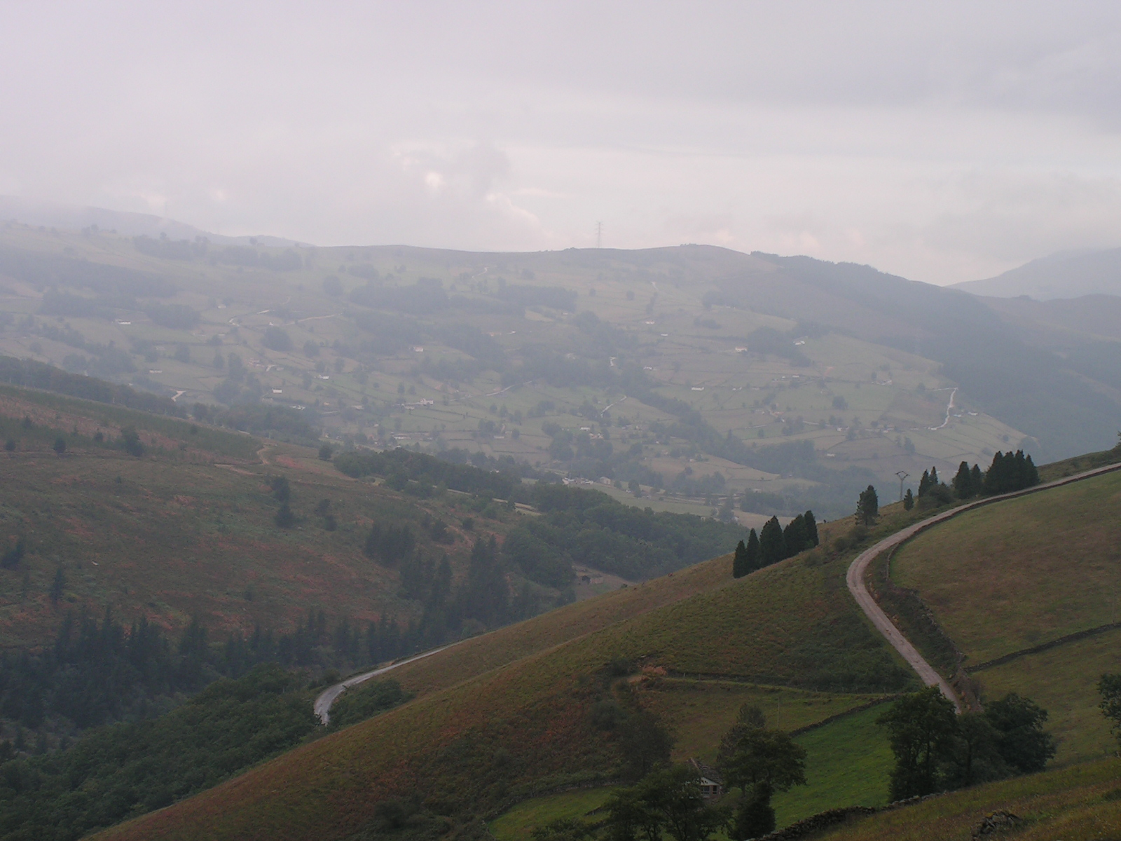 Puerto de la Magdalena o Matalena, entre las provincias de Cantabria y Burgos (España).